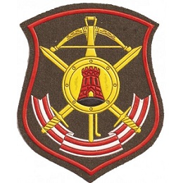 62-я ракетная Ужурская Краснознамённая дивизия имени 60-летия СССР РВСН